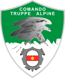 Distintivo del Comando Truppe Alpine.